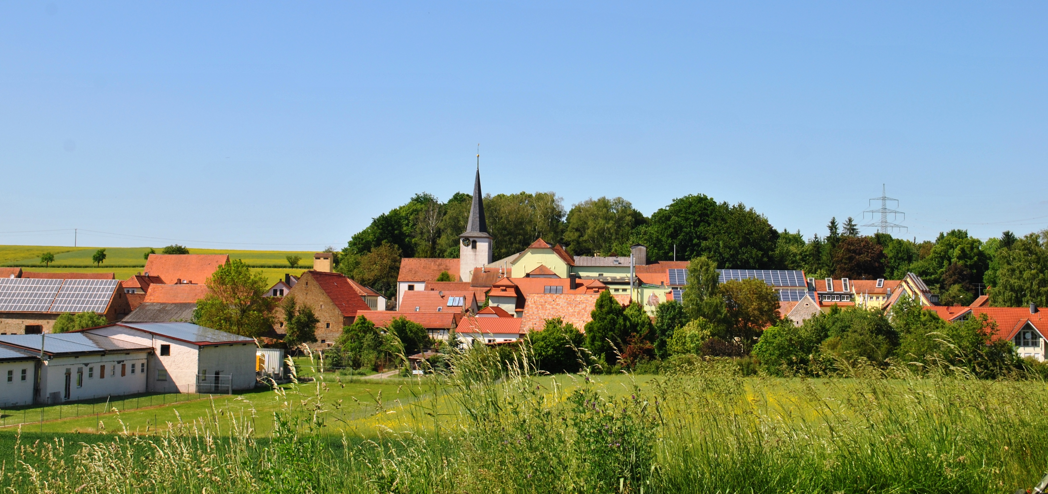 Panorama Volkach-Krautheim